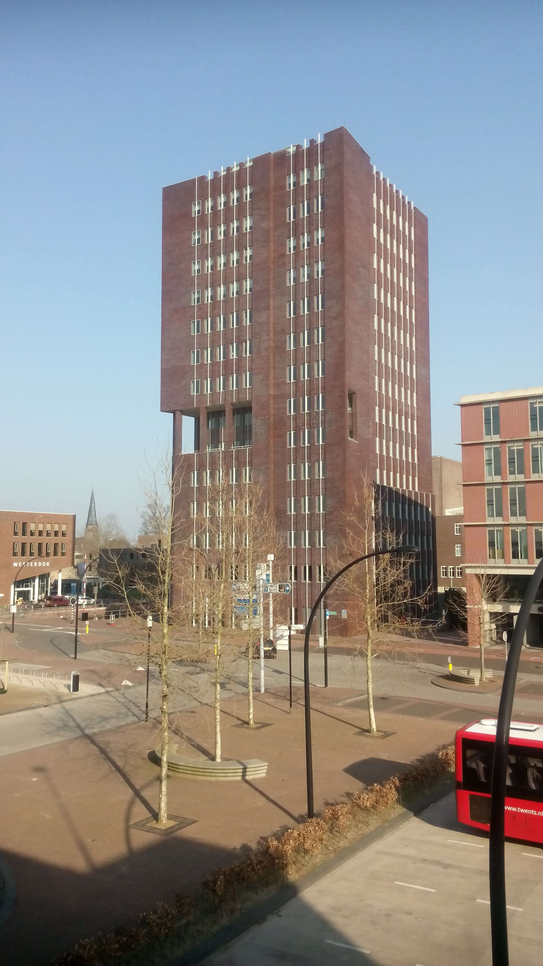 Javatoren, Almelo NL, maart 2017